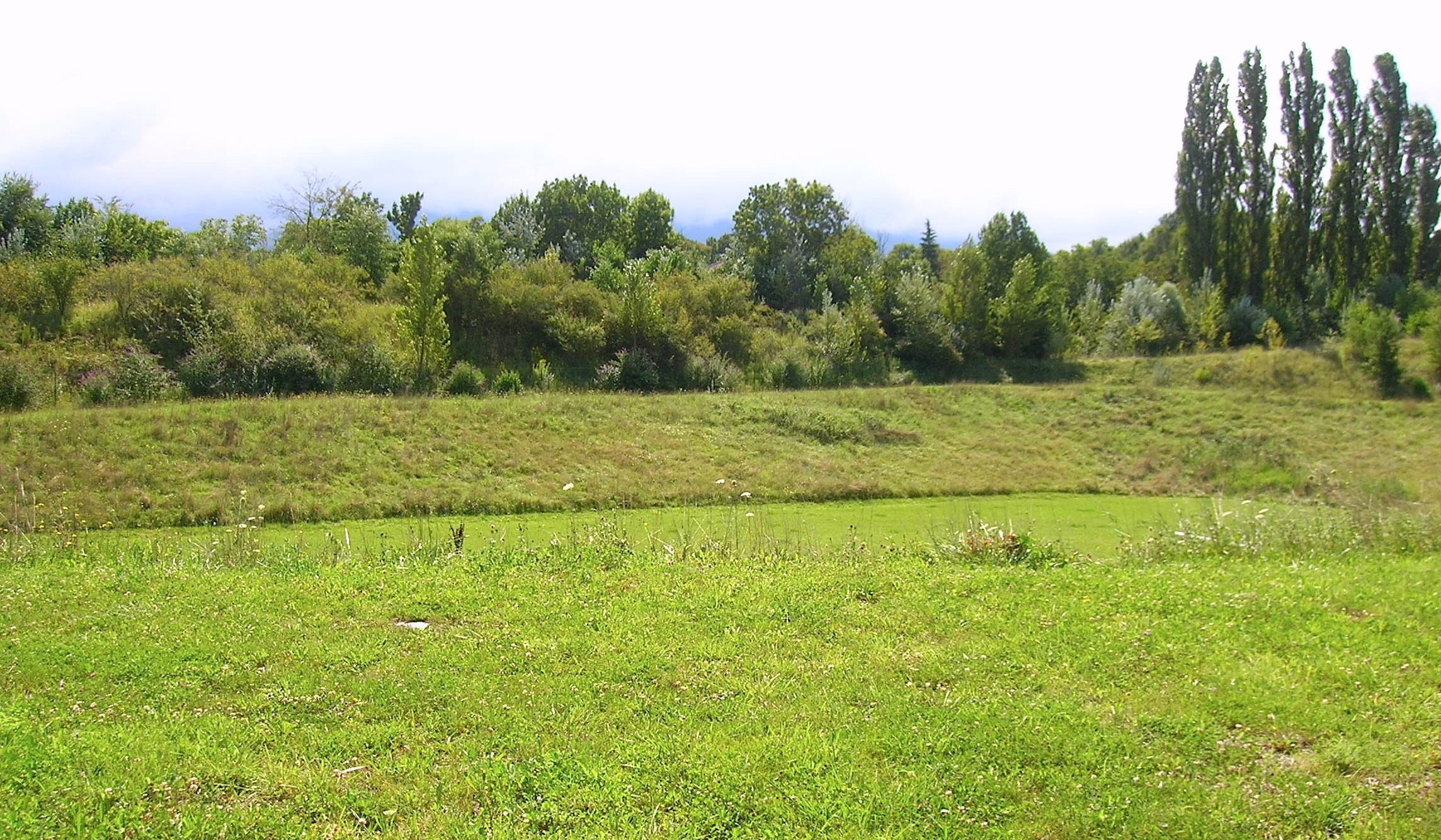 Tavernolles, Brié-et-Angonnes, Isère, France